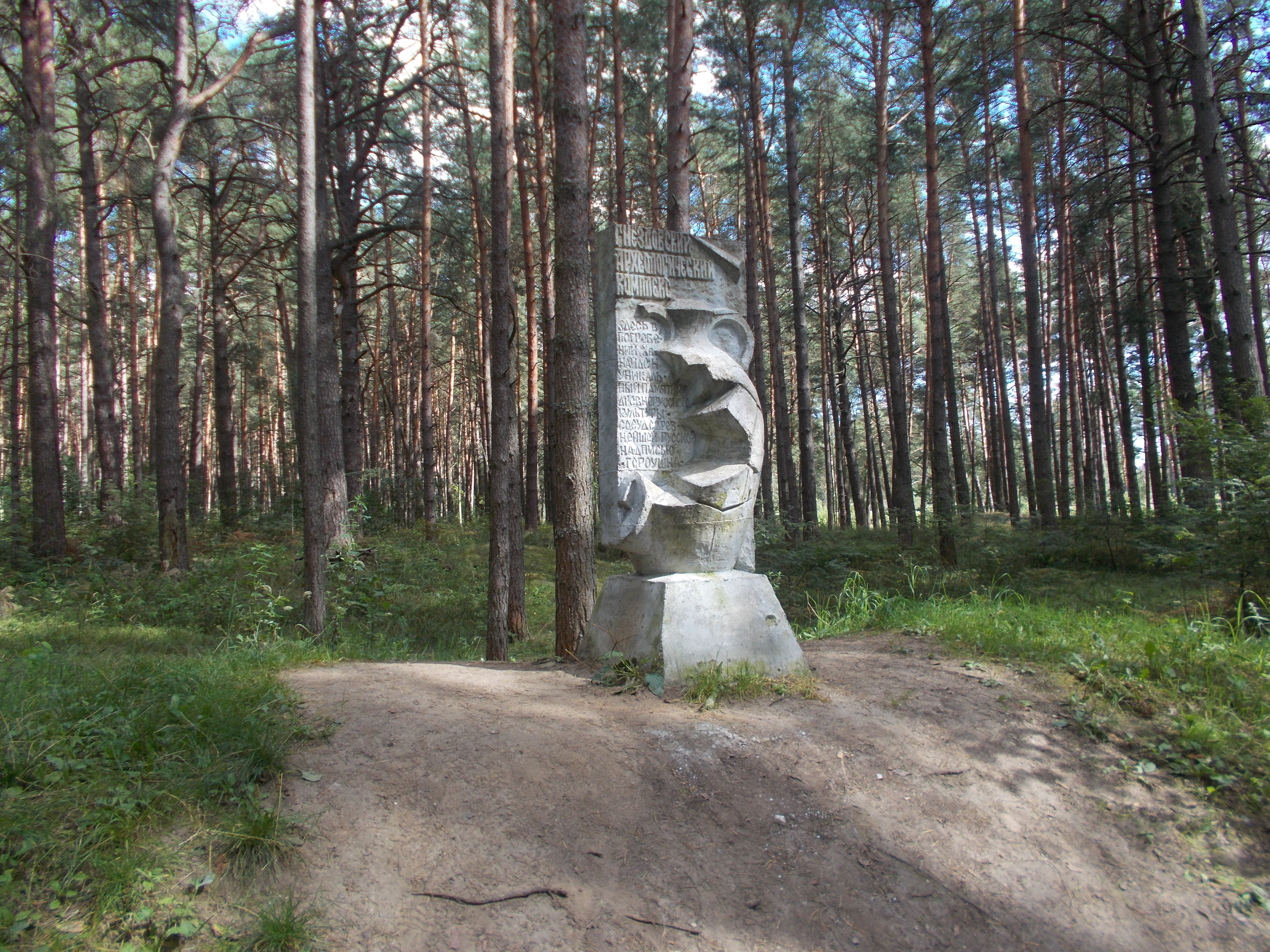 Музей-заповедник "Гнездово", лесная курганная группа, курган Л-13: Гнездово, Смоленский район, Смоленская область